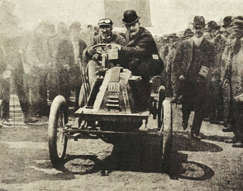 Louis Renault, première voiturette de Paris-Berlin 1901 - La Vie au Grand Air du 31 décembre 1903, p.979